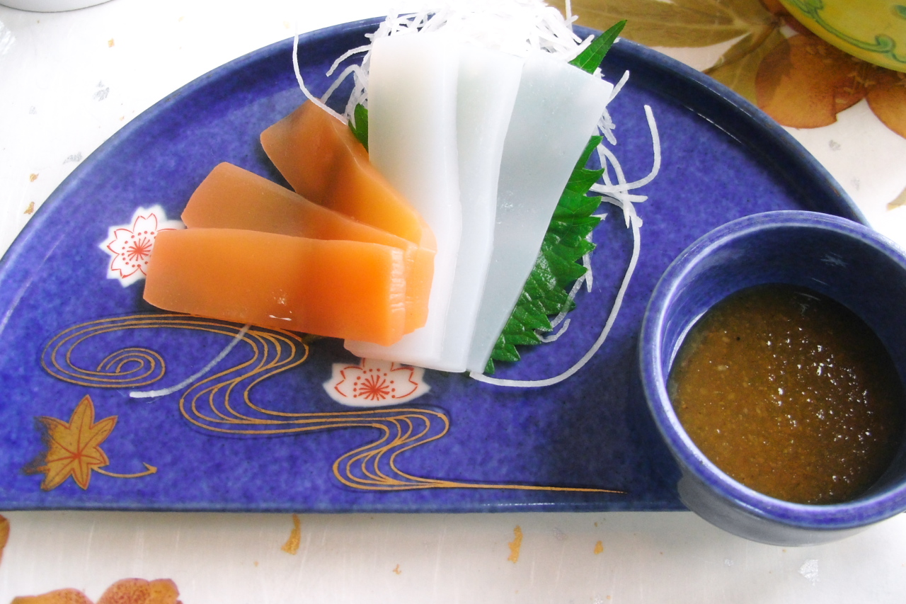 10/20にきのこを食べに長野県上田の「きのこむら深山」に行ってきました。きのことあまり関係なさそうな刺身こんにゃく。raw konjak